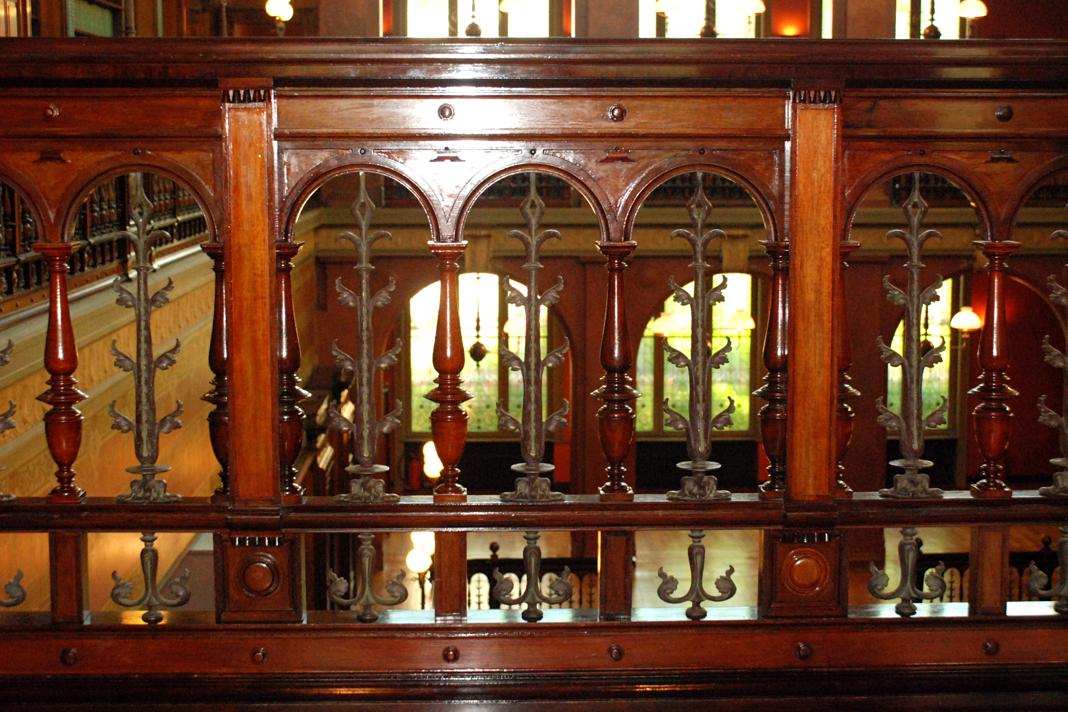 Belgique - Bruxelles - Bibliothèque Solvay